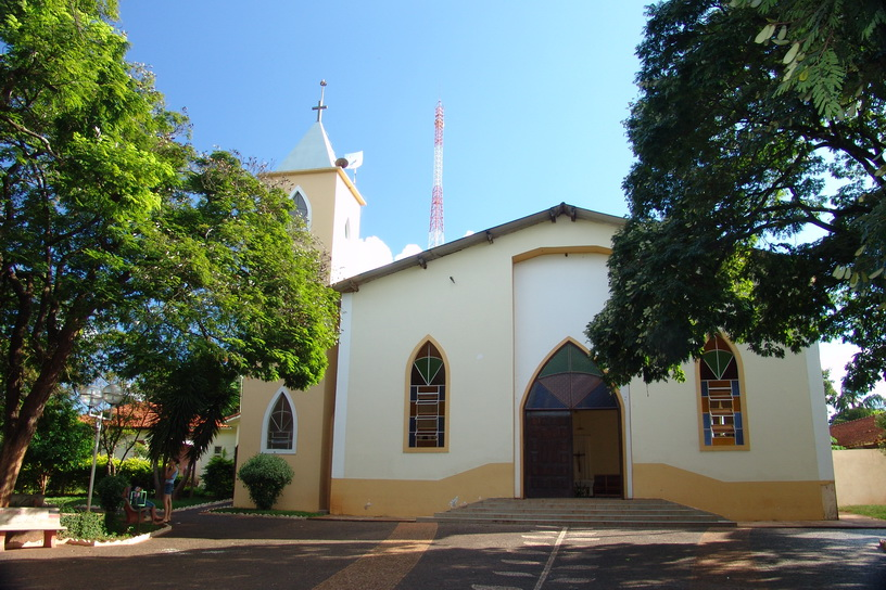 Imagem do município de Espírito Santo do Turvo, estado de São Paulo, Brasil.